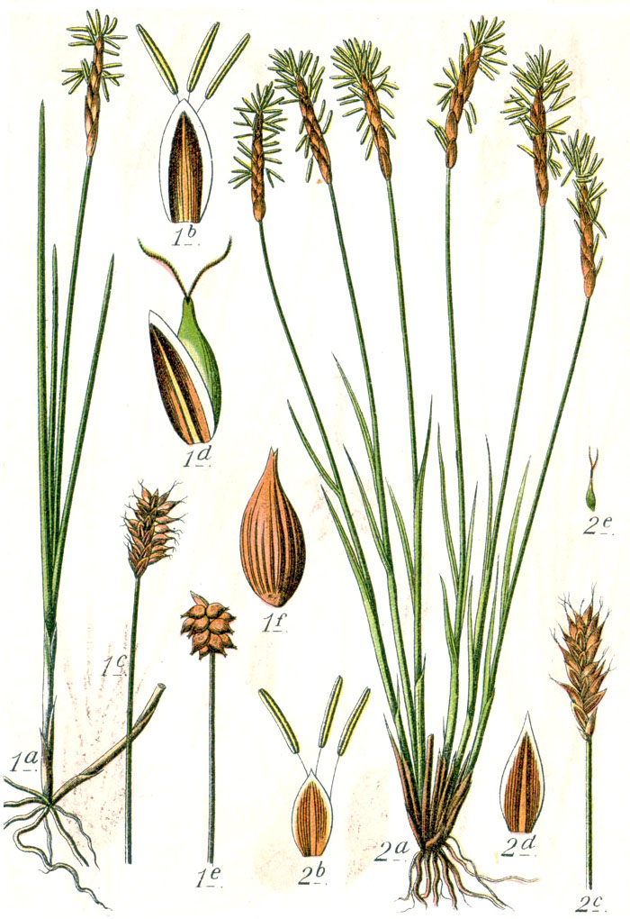 1. Carex dioica L., 2. Carex davalliana Sm. Original Caption 1. Zweihäusige Segge, Carex dioeca 2. Davall's-Segge, C. davalliana